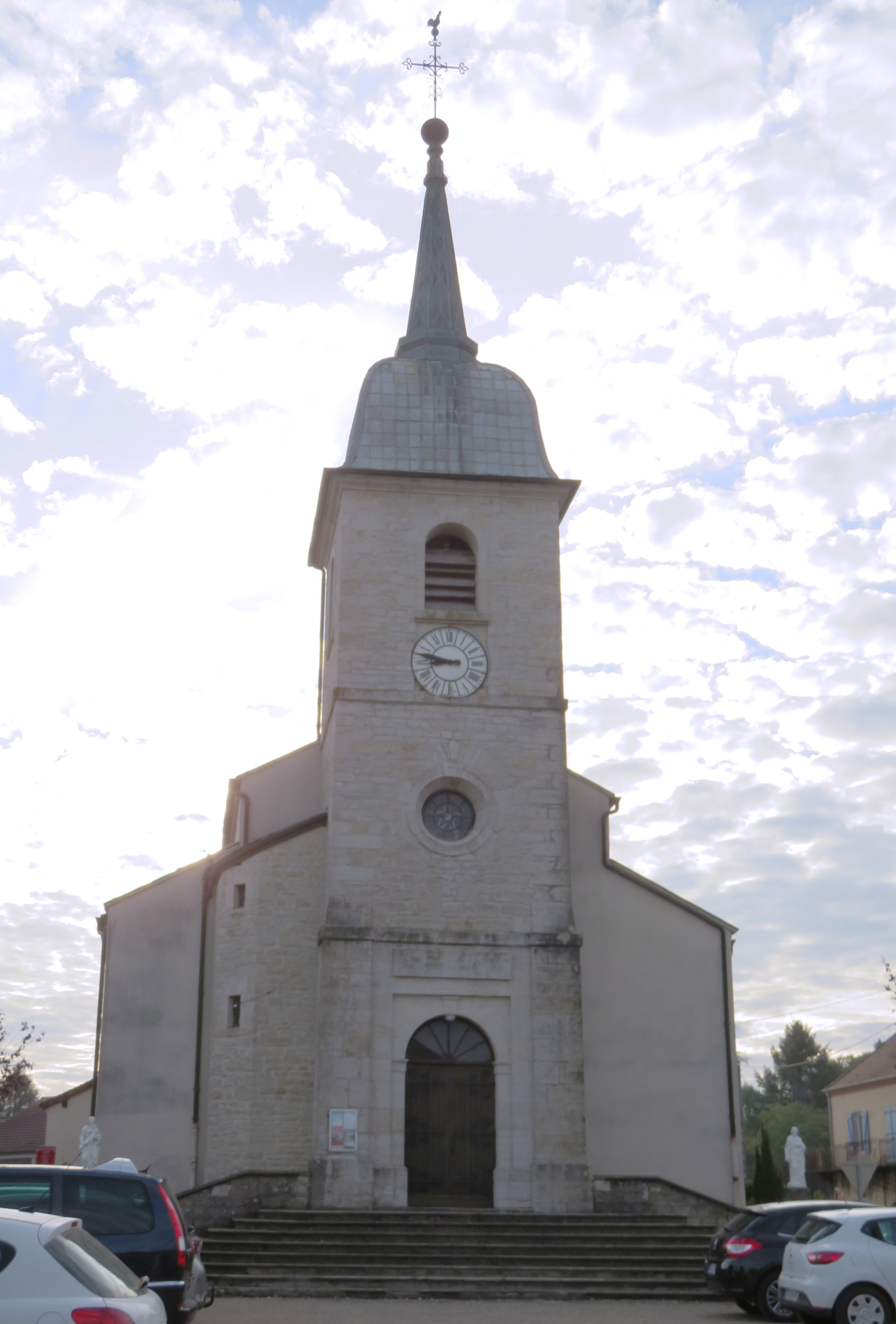 Église Sainte-Marie-Madeleine de Commenailles dans le département du Jura.